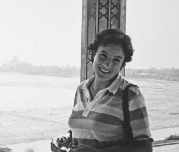 Salud Hernández Mora joven